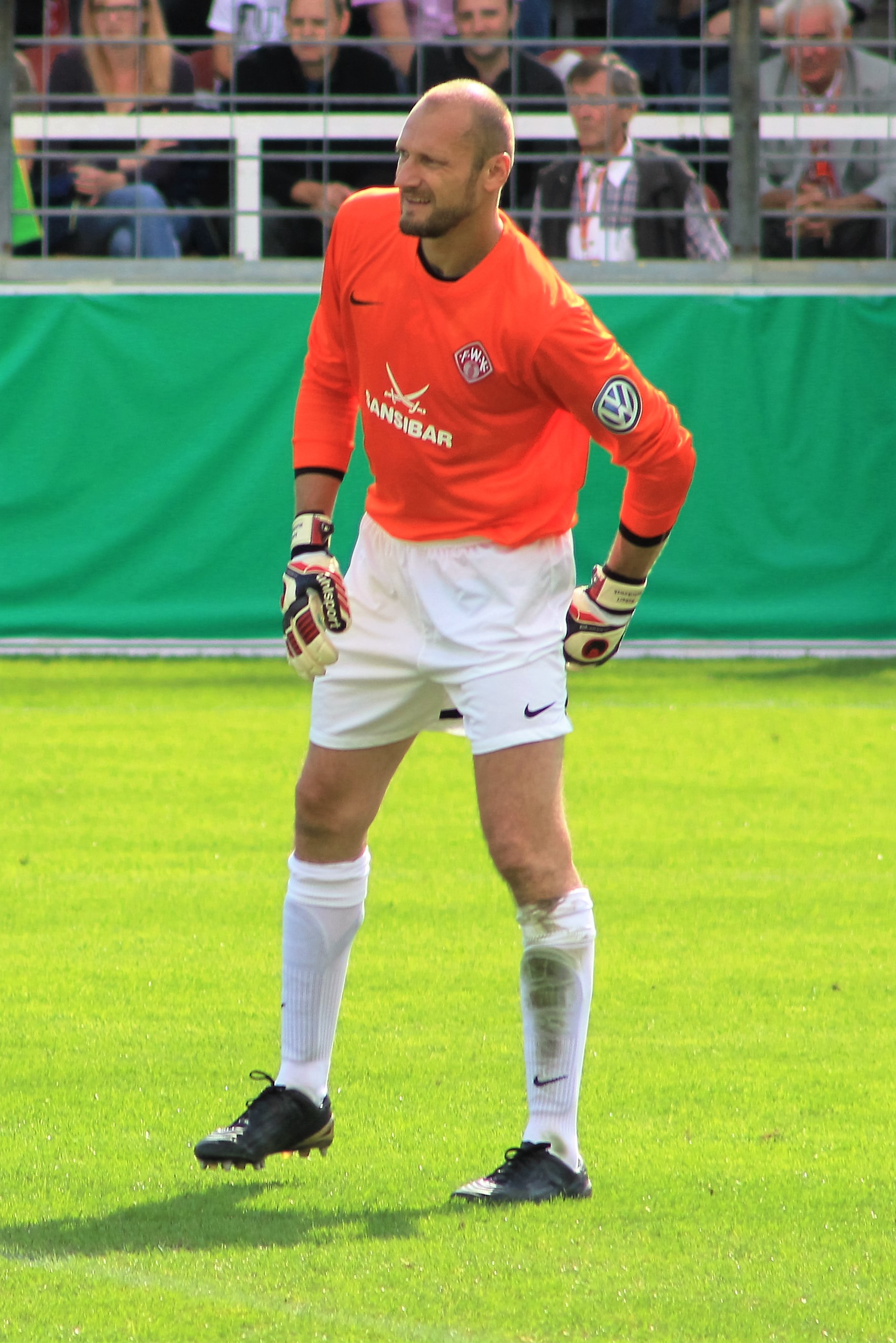 Wulnikowski, Robert Würzburg 14-15